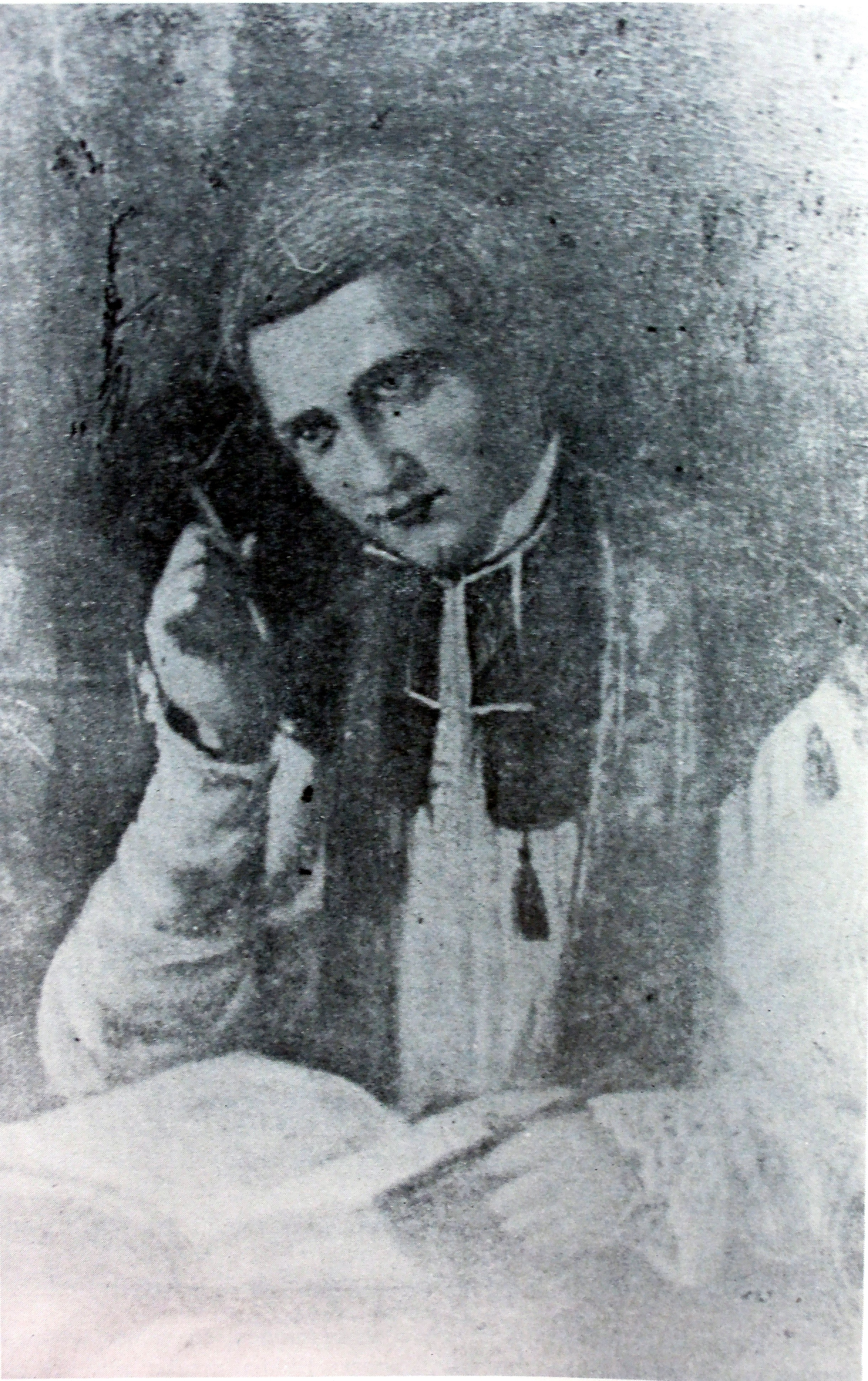 Pfarrer Philipp Schmitt geb. 1805, gest. 1855